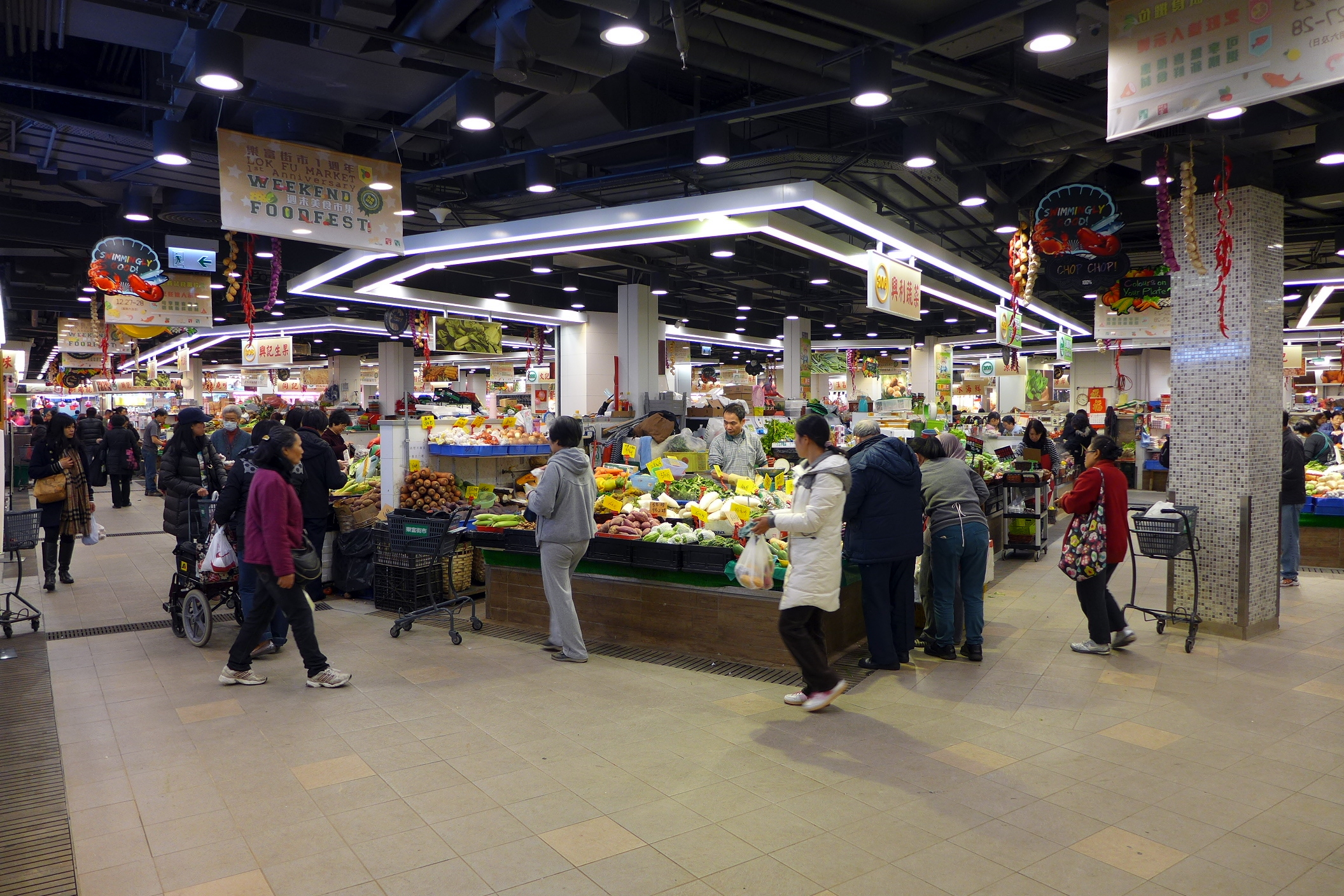 Lok Fu Market